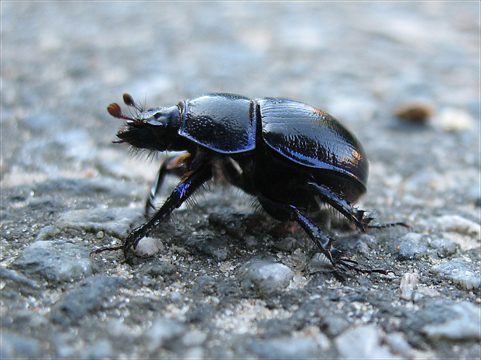 Makroaufnahme eines Mistkäfer, von der Seite fotografiert Dual-Licensing: Sollten Sie dieses Bild für Zwecke verwenden wollen, für welche die Bedingungen der "cc-by-sa"-Lizenz inakzeptabel sind, wenden Sie sich bitte an den Urheber (